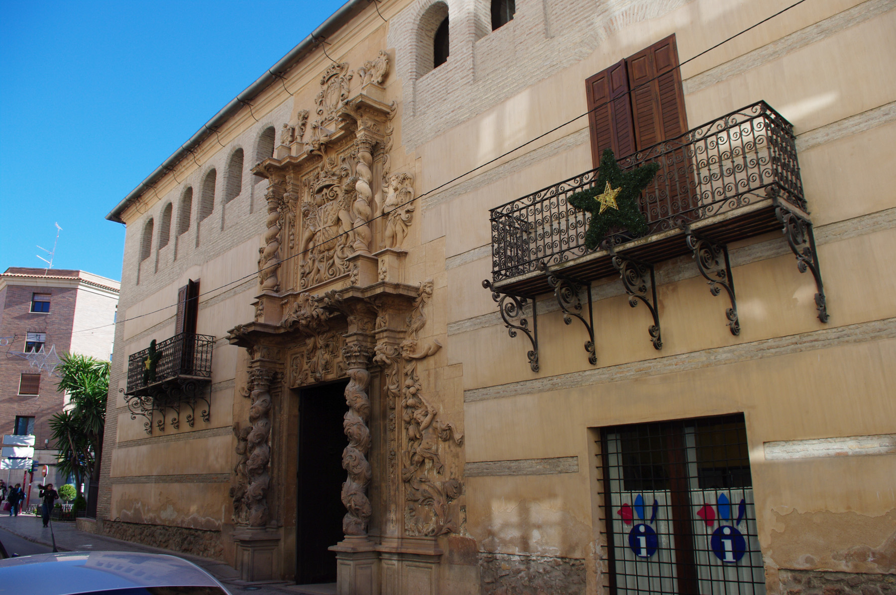 Fachada del Palacio de Guevara en Lorca (Murcia)